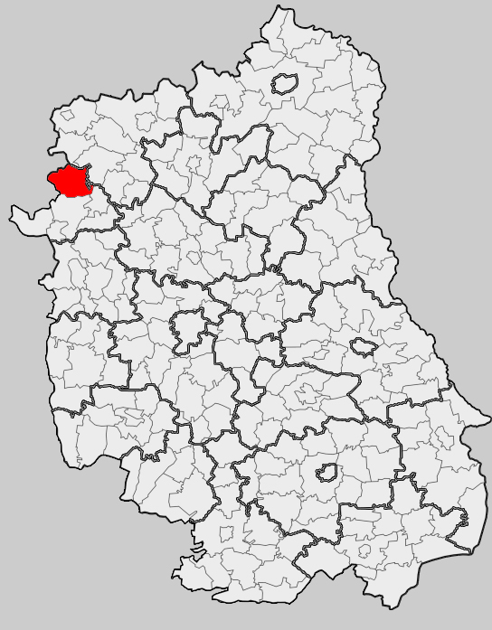 Map of gmina Kłoczew, Ryki county, Lublin voivodship Mapa gminy Kłoczew, powiat rycki, województwo lubelskie